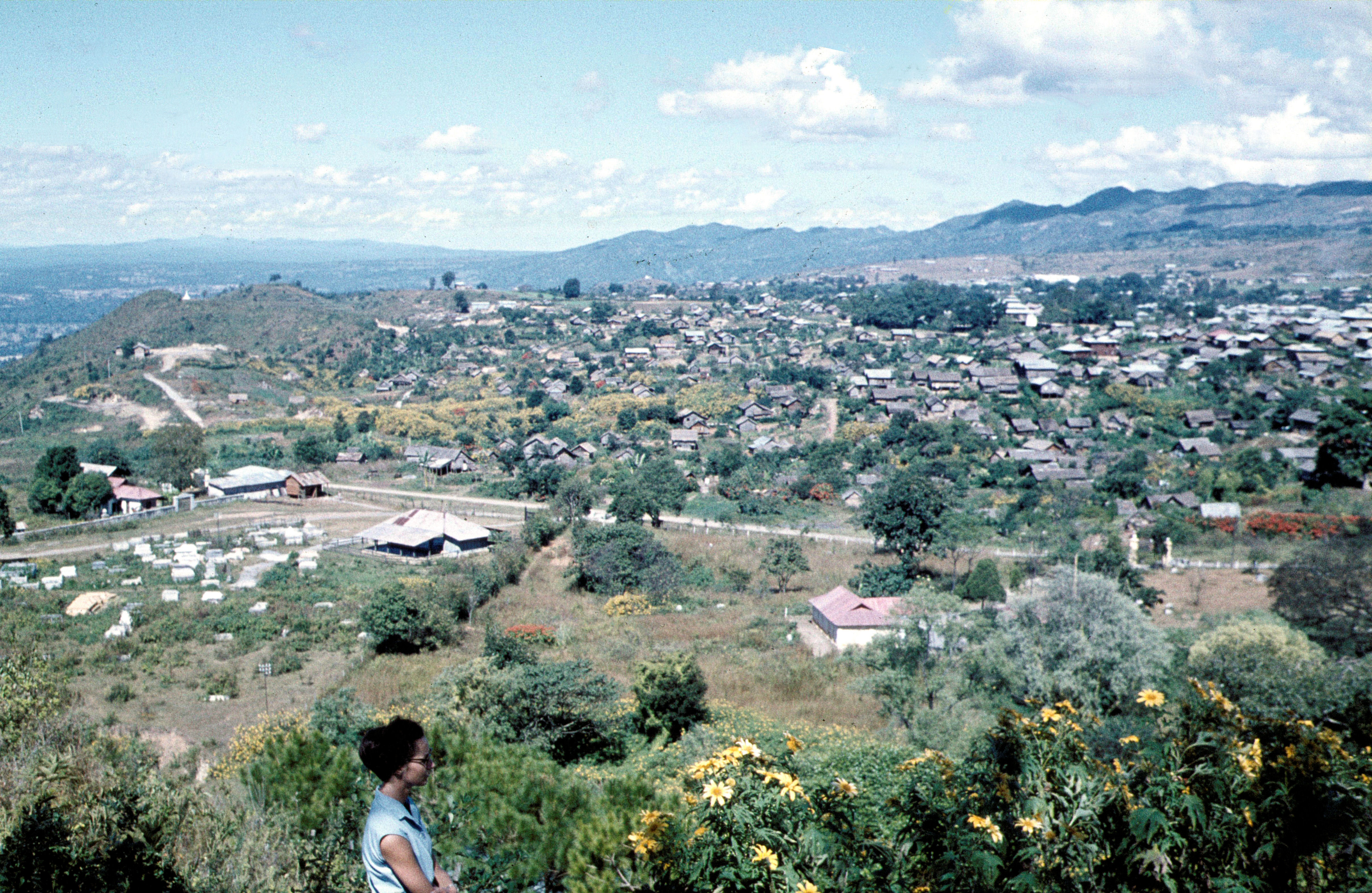 Taunggyi